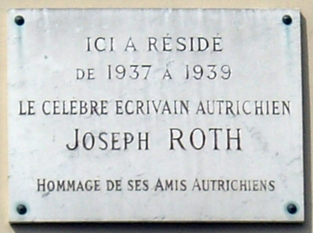 Plaque apposée au n° 18 de la rue de Tournon, Paris 6e, où résida l'écrivain Joseth Roth (1894-1939) de 1937 à 1939.